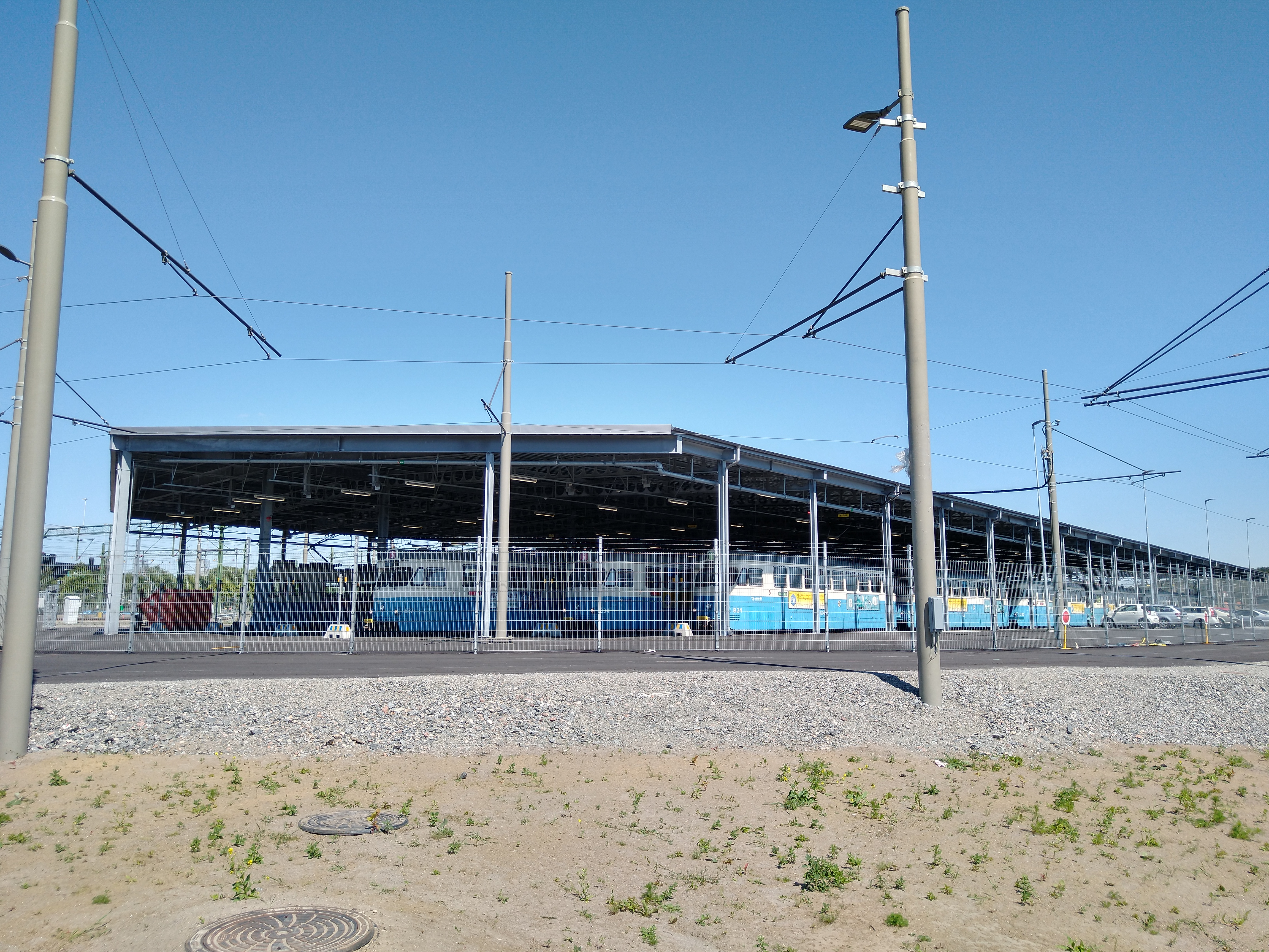 Vagnhallen Ringön, Göteborg. Från söder. Spårvagnshall.